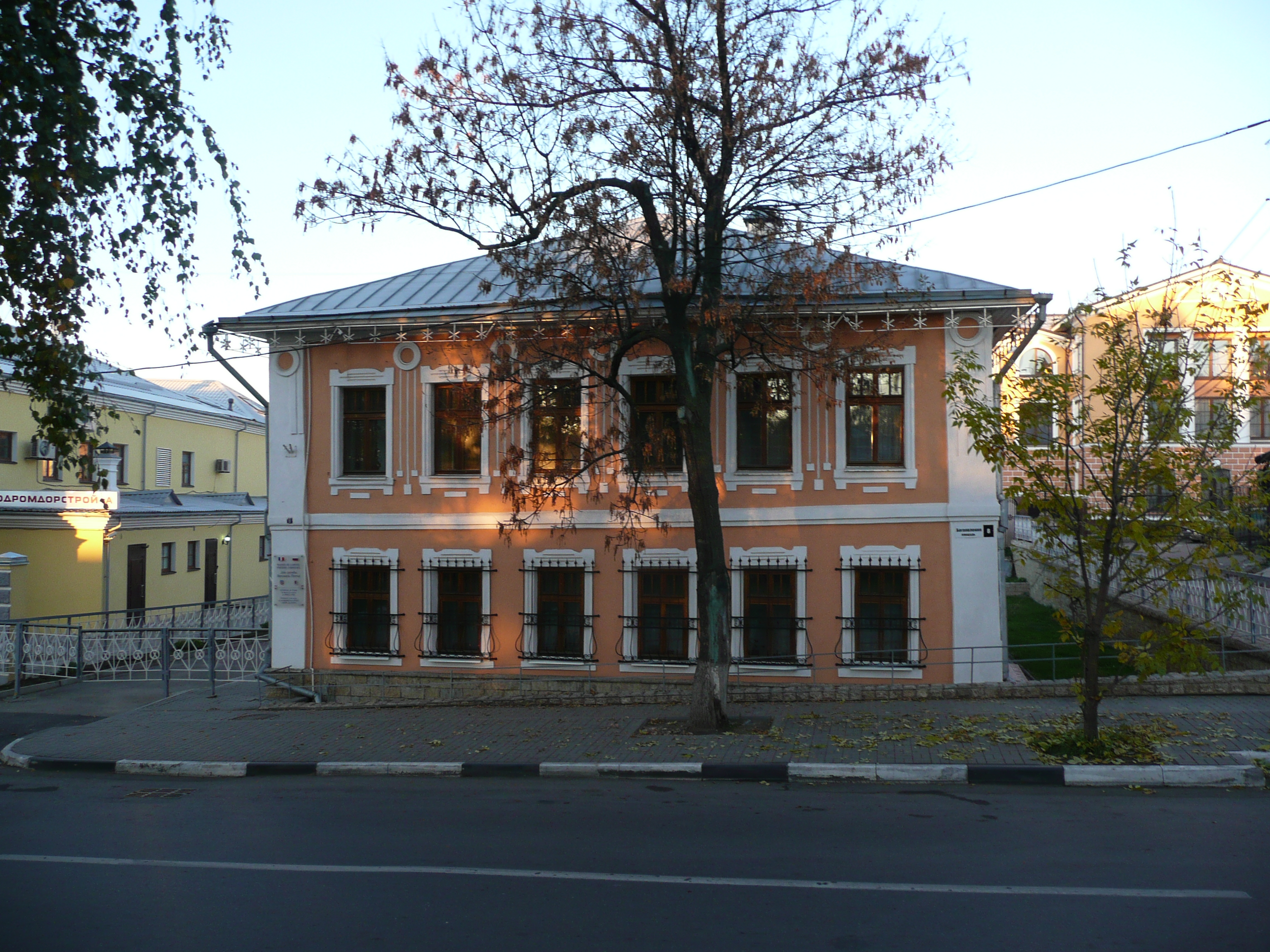 Дом Покидышева: площадь Богоявленская, 8, Ярославль, Ярославская область